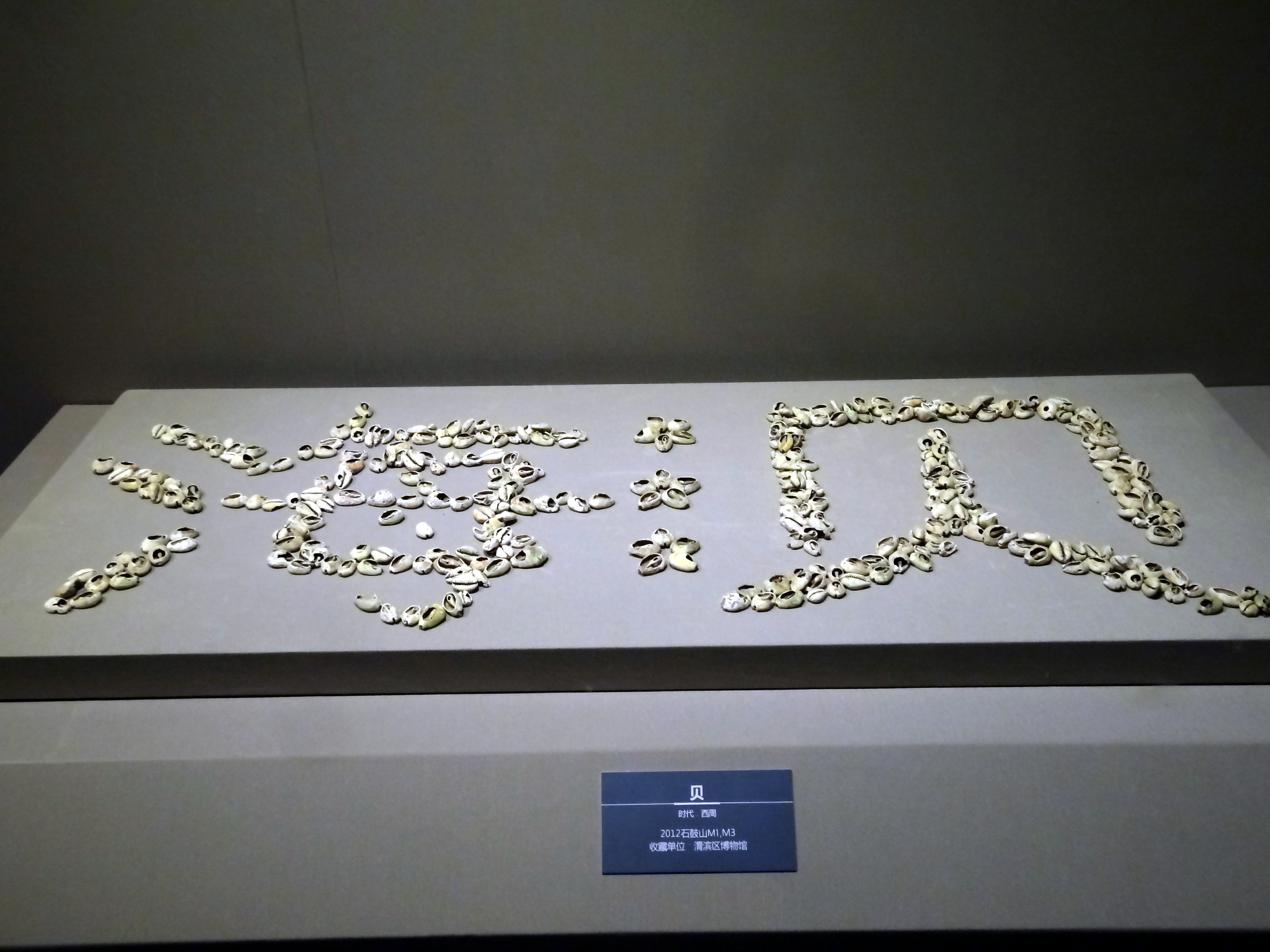 贝币，西周时期，2012年出土于石鼓山M1、M3三座墓葬，拍摄于宝鸡青铜器博物院